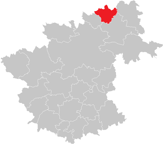 Bezirk Zwettl